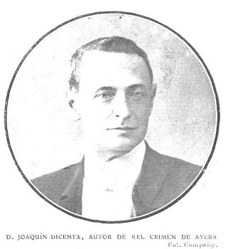 Retrato del dramaturgo Joaquín Dicenta, obra de Manuel Compañy, recogido en la revista española Actualidades.